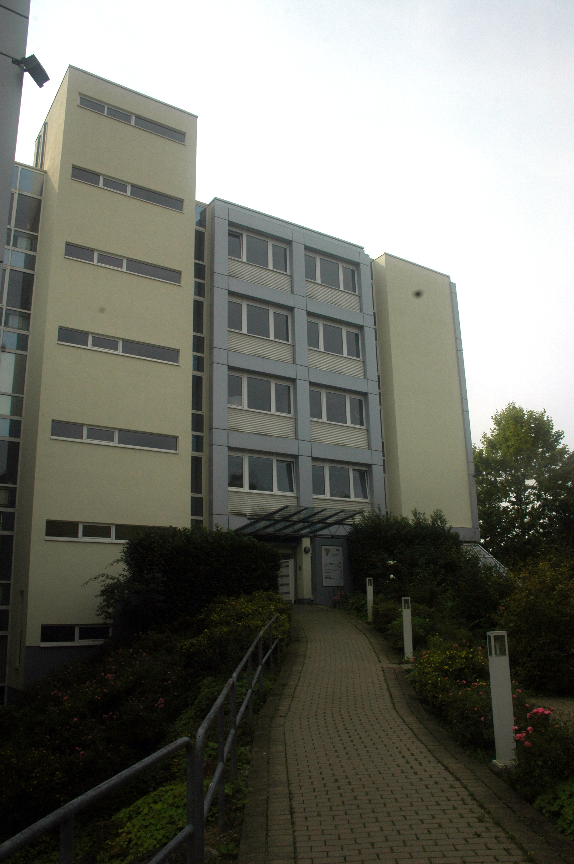 Heidelberg - Im Neuenheimer Feld 515, 516, 517